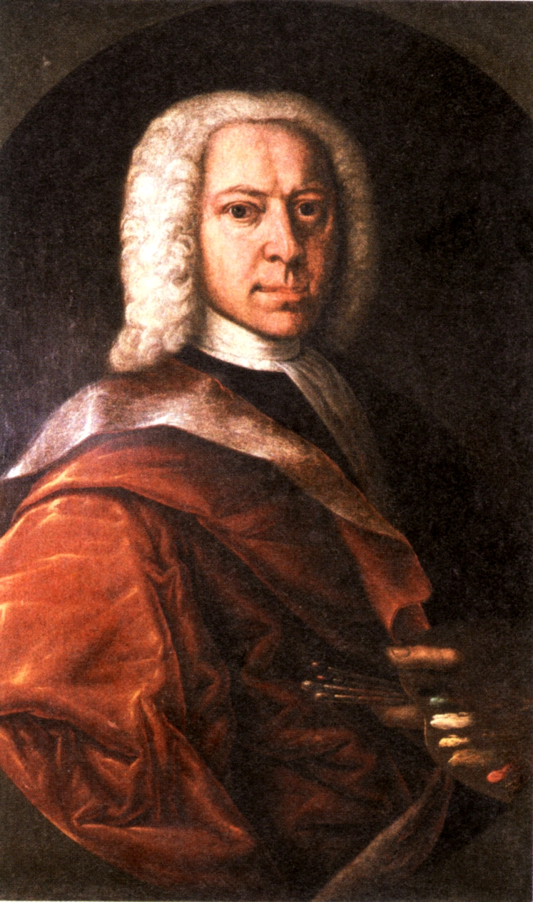 Selbstporträt des österreichischen Barockmalers Johann Carl von Reslfeld